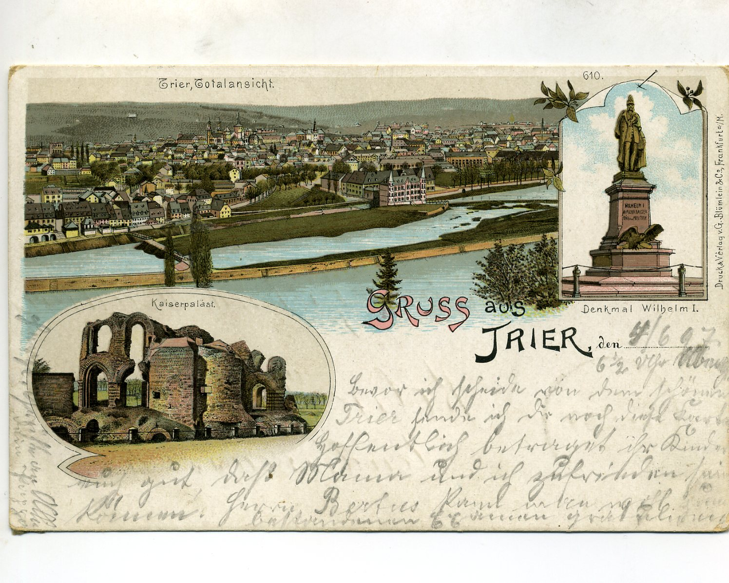 Ansichtskarte; Kaiserpalast - Denkmal Wilhelm I